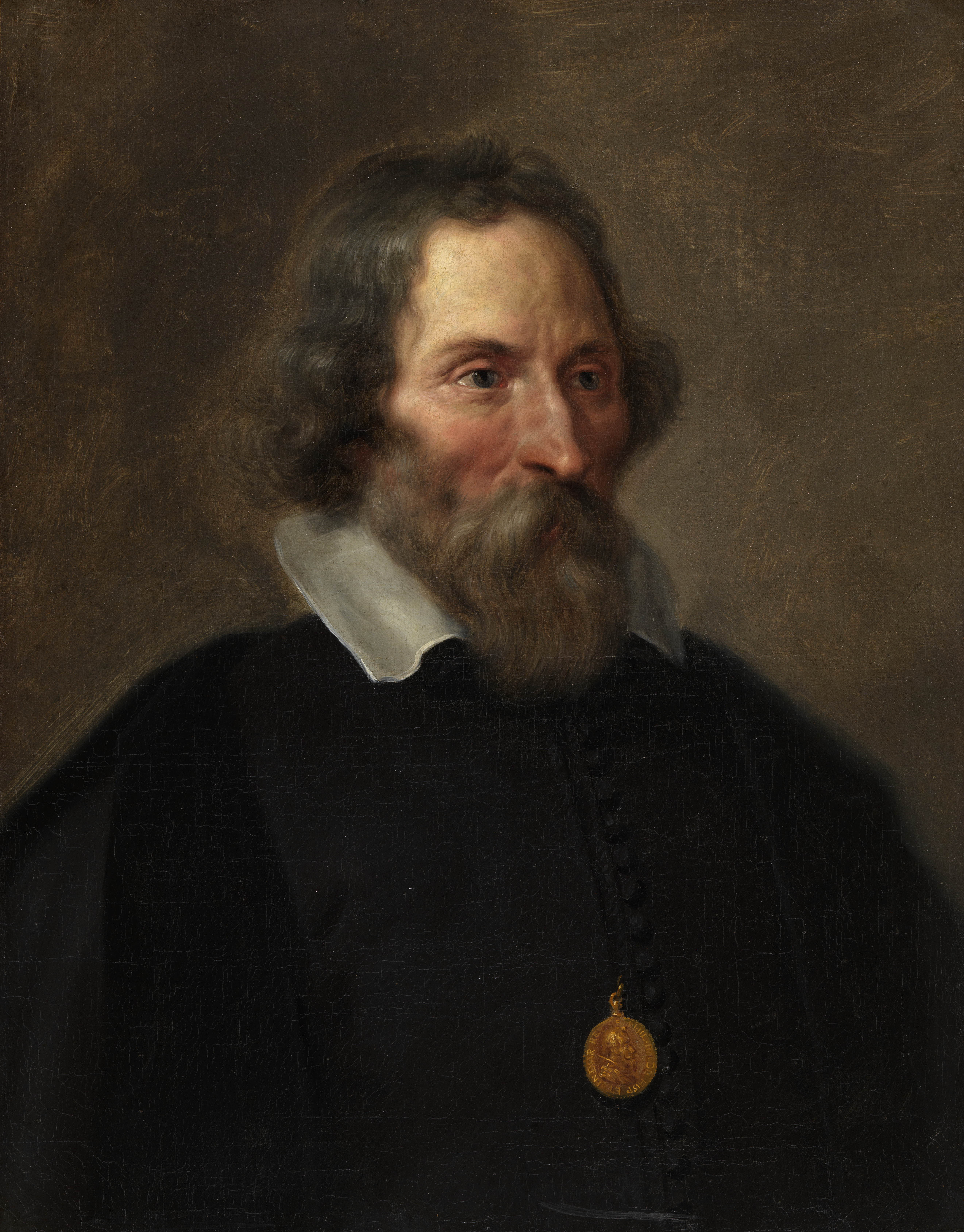 Thomas Willeboirts Bosschaert: Retrato de Erycius Puteanus con una medalla de Felipe III sobre el pecho. Óleo sobre lienzo, 65,4 x 50,7 cm, Amberes, Museum Plantin-Moretus. [1]